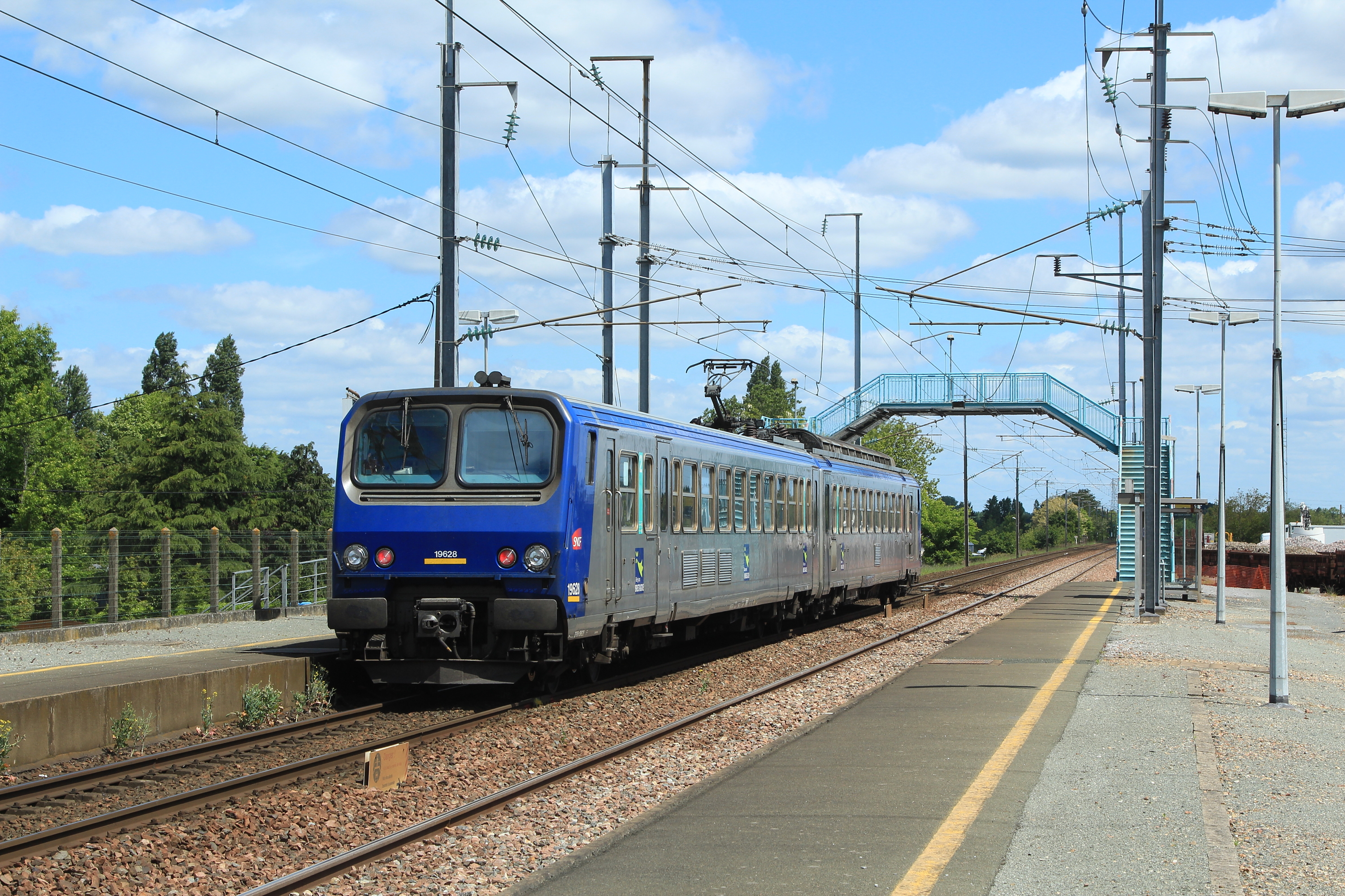 La Z 9628 en livrée TER Institutionnel et portant les logos de la Région Bretagne assurant le TER n°857314 (Angers - Le Mans de mi-journée) s'arrête en gare d'Écouflant.